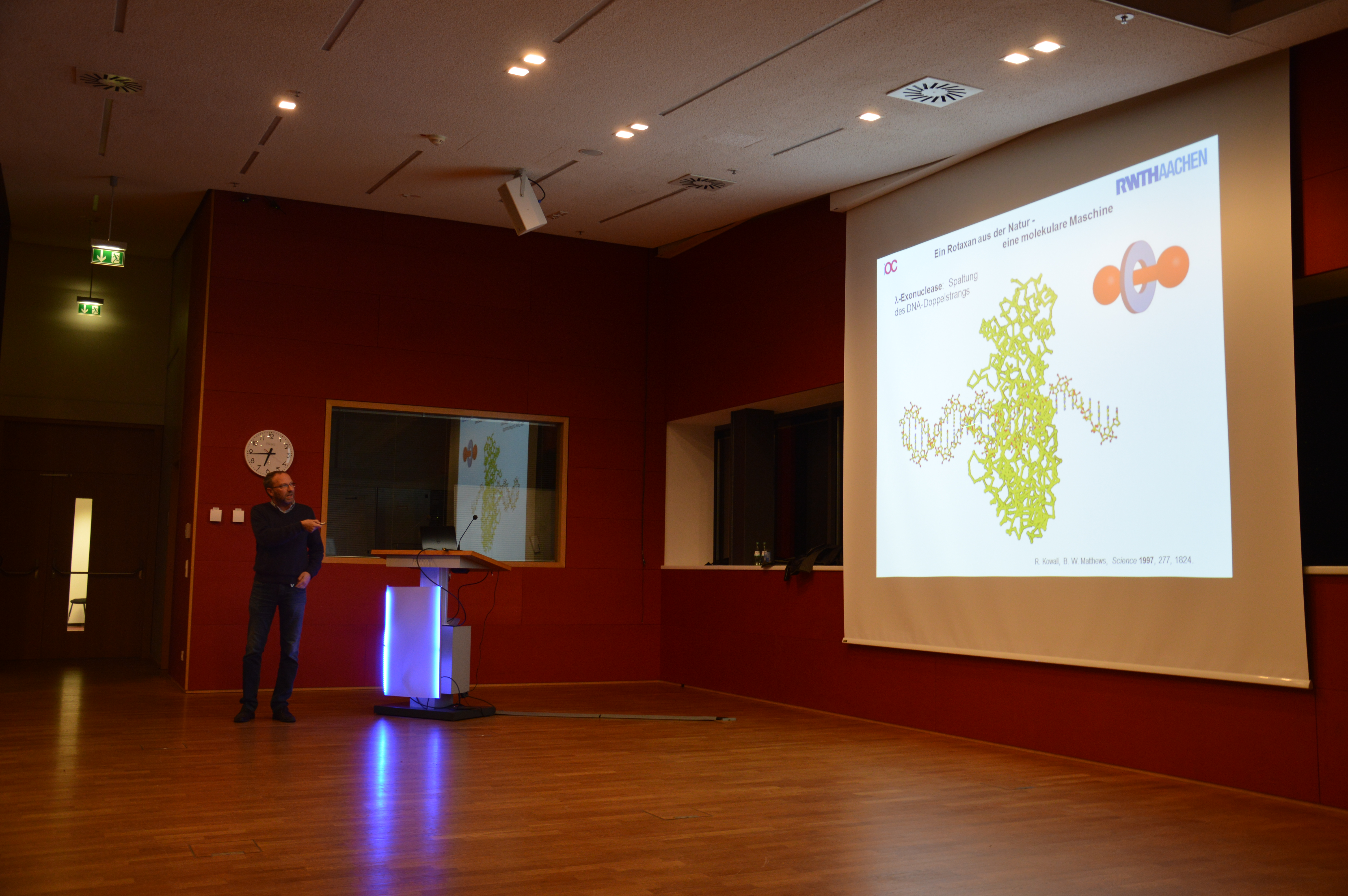 Vortrag zum Nobelpreis in Chemie